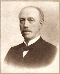 Willem Willemsz Ruijs (Rotterdam, 17 maart 1837 – aldaar, 3 september 1901) was een reder.